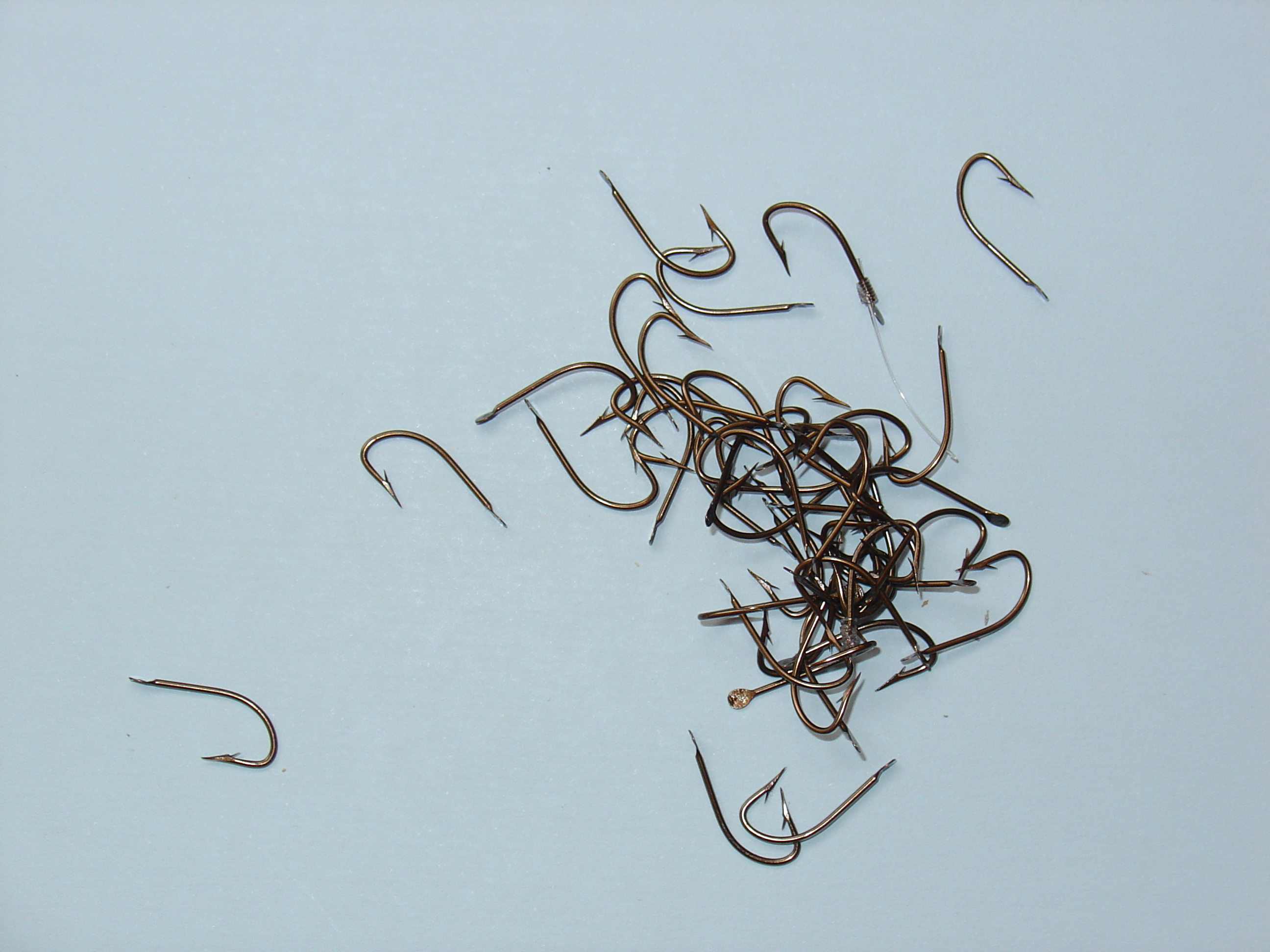 Fishing hooks; Anzuelos pequeños de pesca